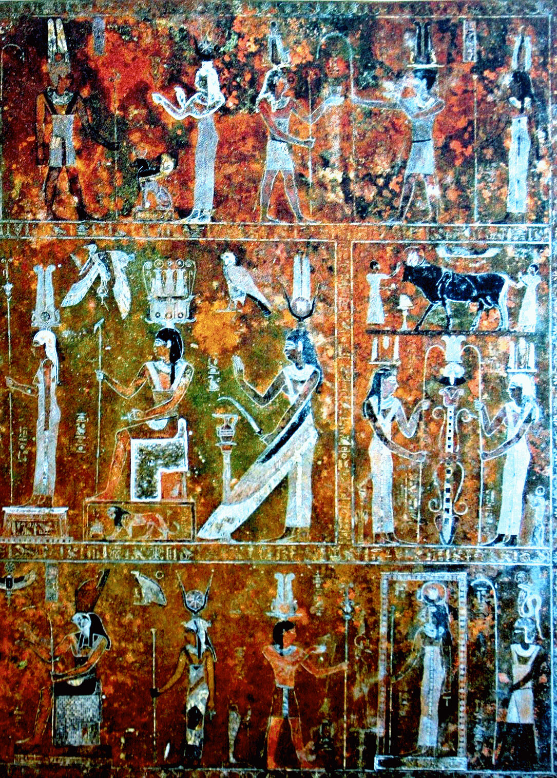 Mensa Isiaca, I sec. a. C. / I d. C., bronzo con altre leghe metalliche intarsiate negli alveoli, 75,5 x 125,5 x 5,5 cm. Torino, Museo Egizio, inv. Cat. 7155.